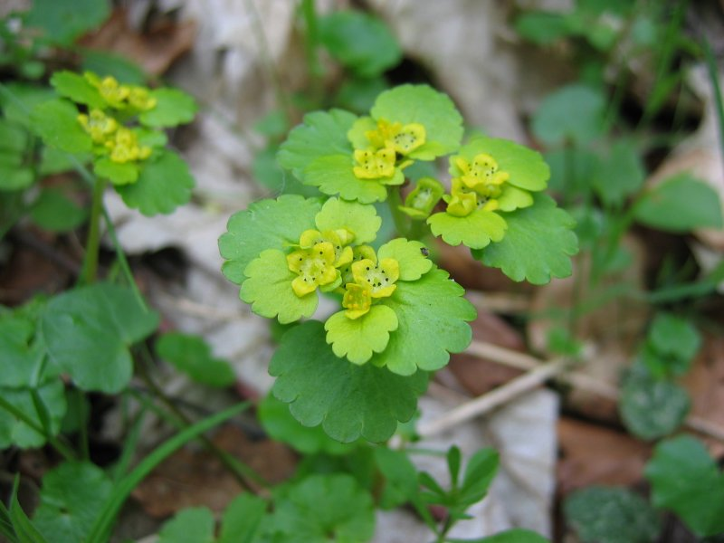 Wechselblättriges Milzkraut Chrysosplenium alternifolium